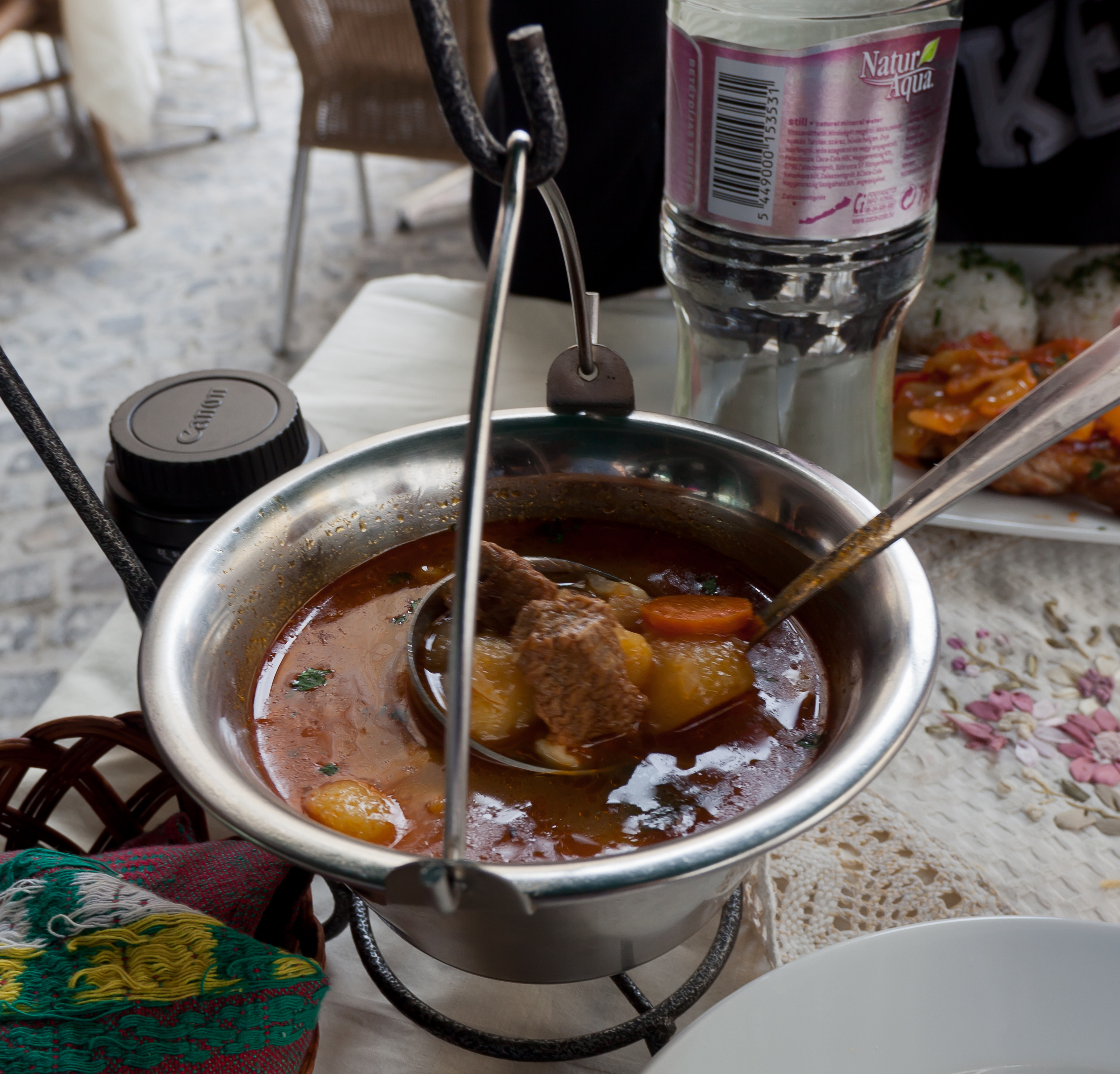 Gulyás bográcsban tálalva